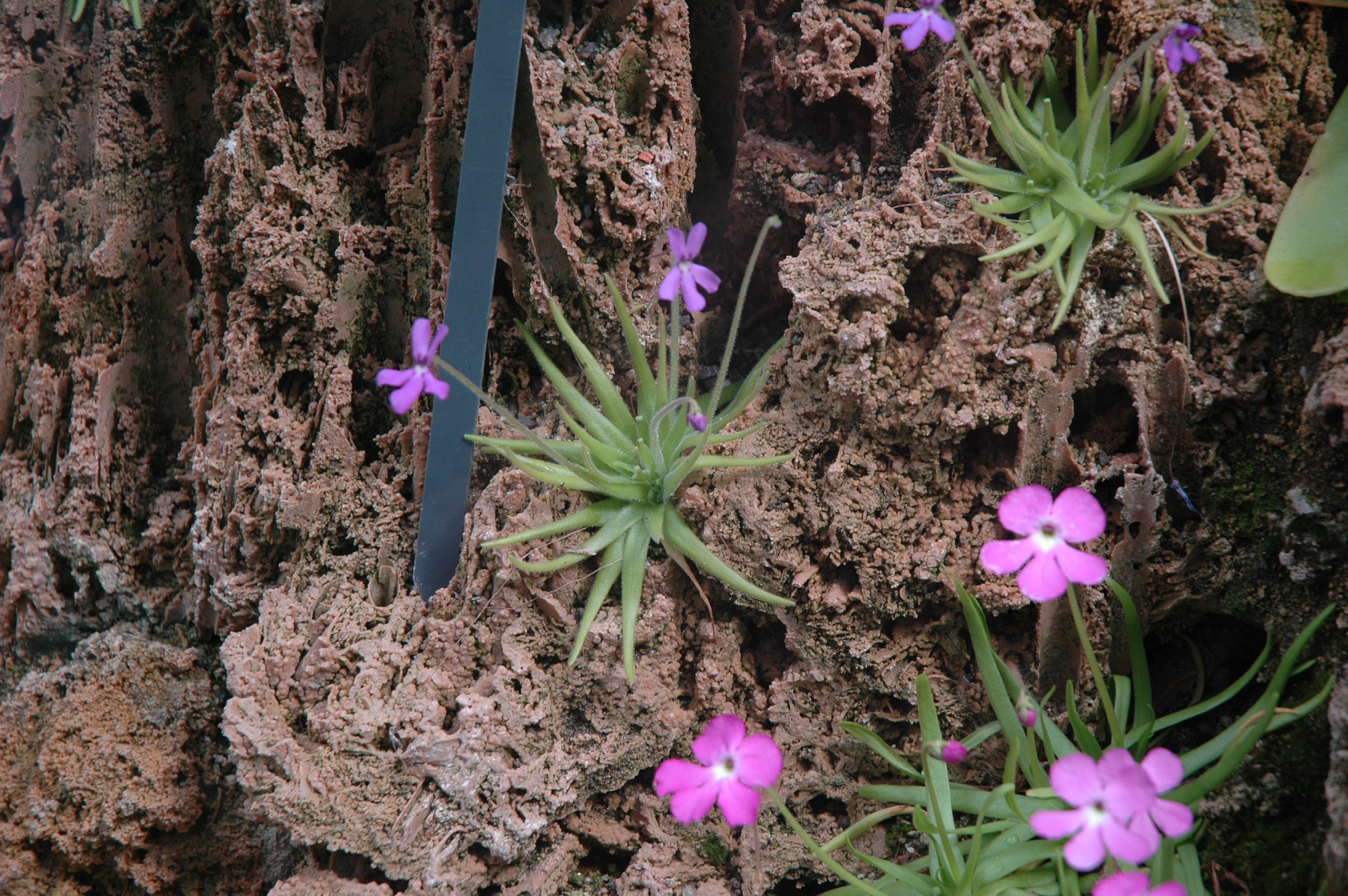 Habit of Pinguicula gypsicola at Jena Botanical Garden, Germany